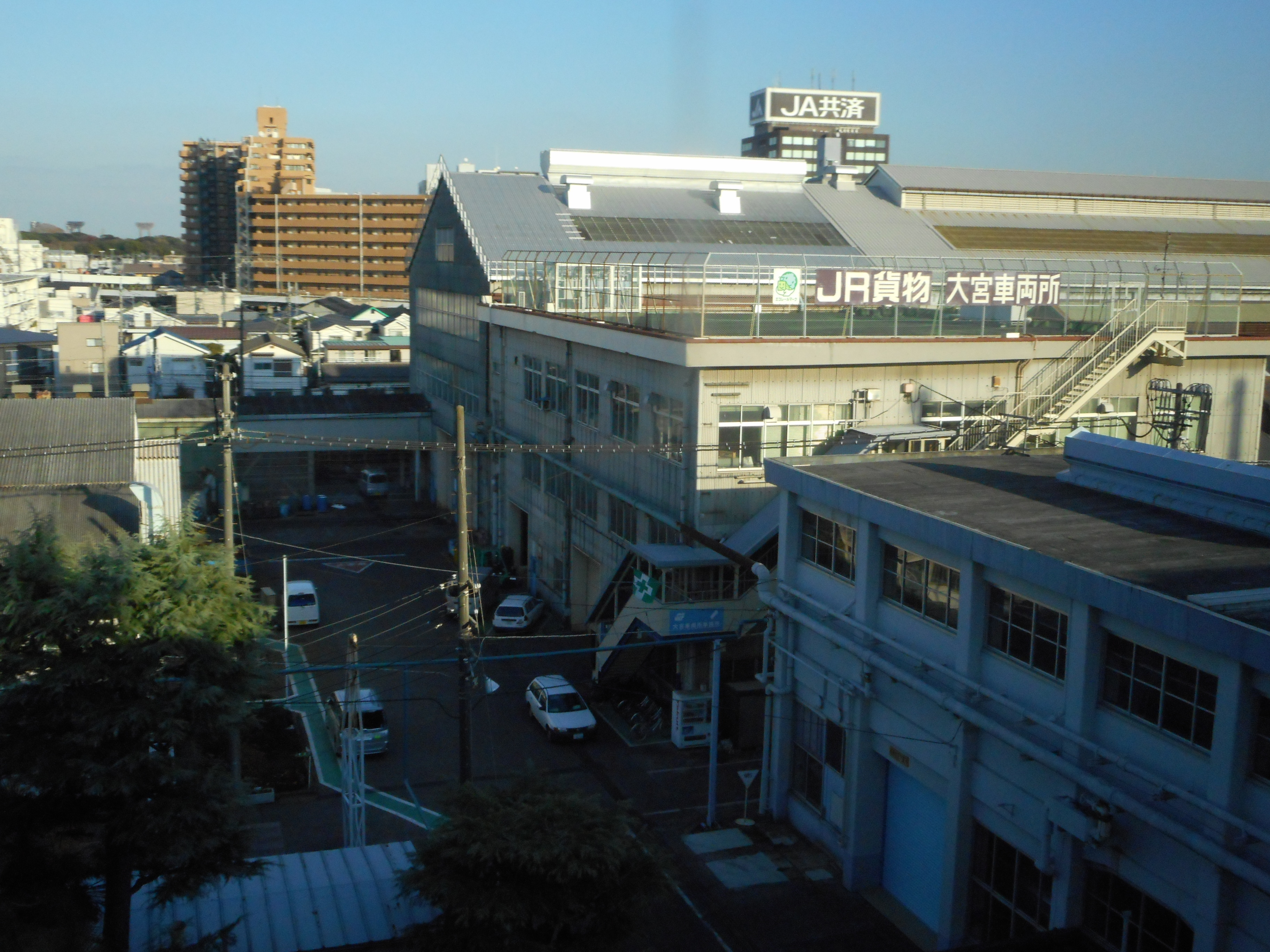 JR貨物大宮車両所、主棟及び事務所（大宮総合車両センター敷地内）－ニューシャトル 鉄道博物館－大宮間車窓から撮影。